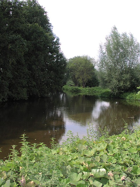 Schwalm zw. Hariksee und Brüggen.